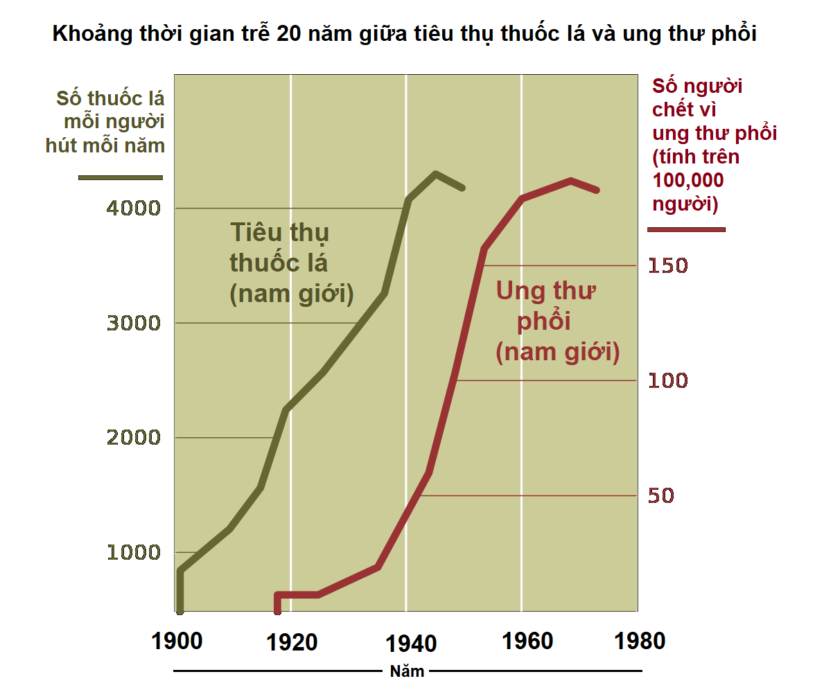 Tương quan giữa hút thuốc và ung thư phổi ở nam giới Hoa Kỳ, cho thấy khoảng thời gian "nghỉ" 20 năm giữa việc tăng hút thuốc lá và tăng tỷ lệ mắc ung thư phổi. Lưu ý - Nguồn được lưu trữ không cung cấp thêm thông tin về dữ liệu mà biểu đồ này được tạo ra. Ví dụ: không có lý do nào được đưa ra để giải thích tại sao biểu đồ chỉ định "(nam giới)" và tại sao phụ nữ không được bao gồm. Nó cũng không chỉ rõ thang đo bên trái đề cập đến số lượng thuốc lá hút trung bình của dân số chung được nghiên cứu, hay chỉ trong số những người hút thuốc thường xuyên. 4.000 điếu thuốc mỗi năm là hơn nửa gói mỗi ngày.